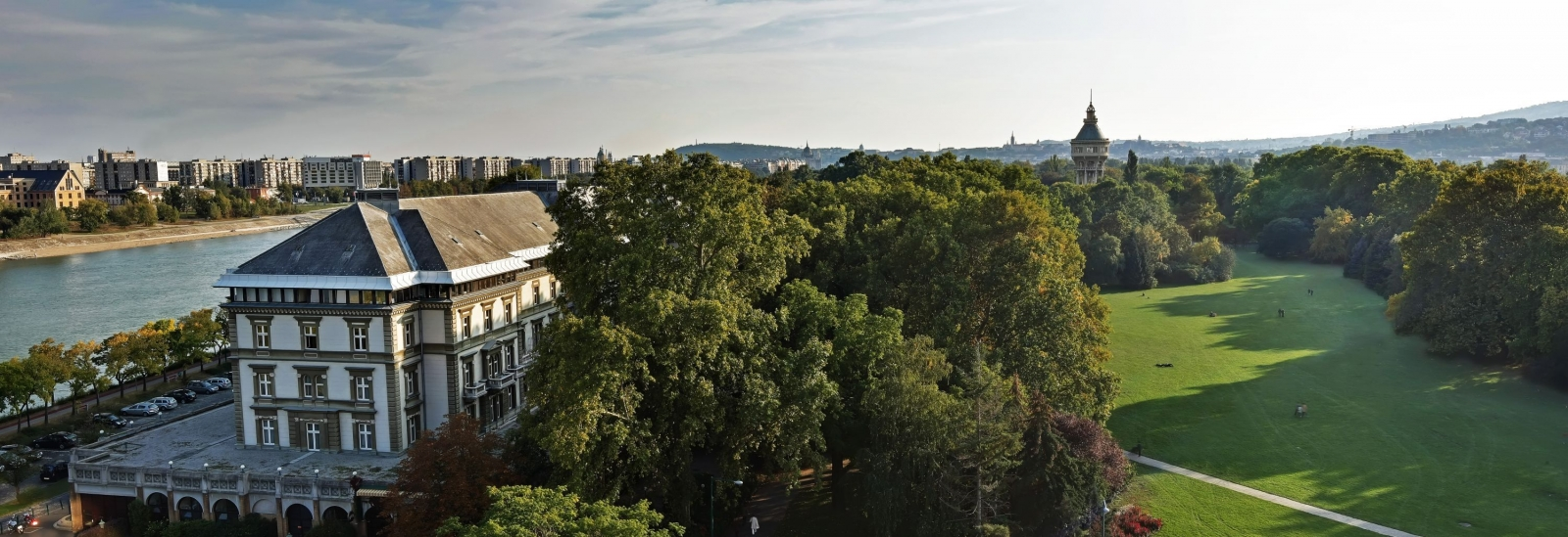 Danubius Grand Hotel Margitsziget madártávlatból (Budapest)